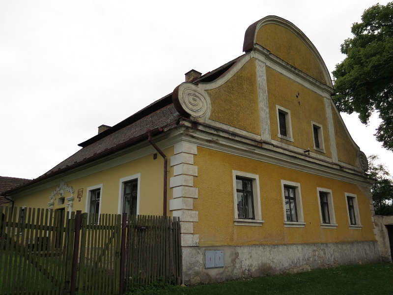 Fara, Dražice 30, Dražice.